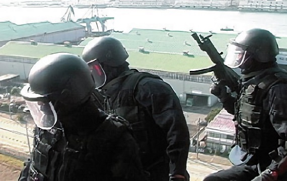 2002年5月10日に公開されたSAT訓練映像からの写真。ヘリコプターからビルの屋上に降りようとするSAT隊員。